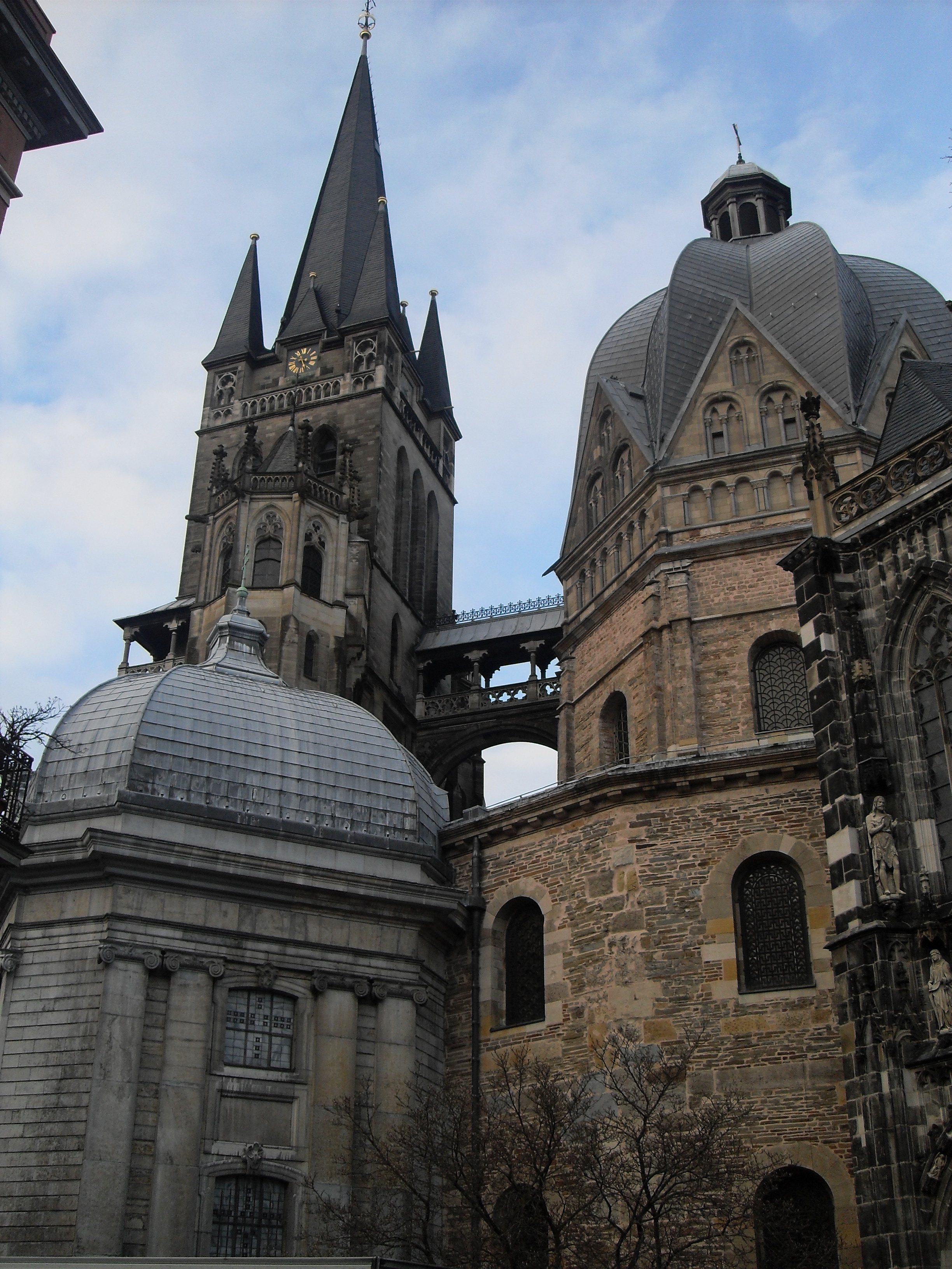 Cathédrale d'Aix-la-Chapelle Aix-la-Chapelle (Aachen) Allemagne